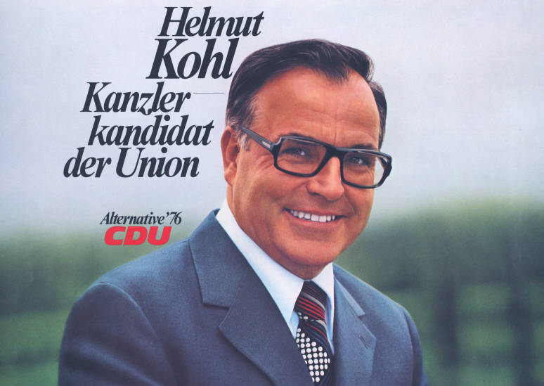 Helmut Kohl Kanzler kandidat der Union Alternative '76 CDU Abbildung:PorträtfotoKommentar:Wandzeitung, s. auch 10-025-67Plakatart:Kandidaten-/Personenplakat mit PorträtAuftraggeber:CDU-Bundesgeschäftsstelle, Abt. Öffentlichkeitsarbeit, Konrad-Adenauer-Haus, BonnObjekt-Signatur:10-001: 2062Bestand:Plakate zu Bundestagswahlen (10-001)GliederungBestand10-18:Plakate zu Bundestagswahlen (10-001) » Die 8. Bundestagswahl am 3. Oktober 1976 » CDU » Mit PorträtfotoLizenz:KAS/ACDP 10-001: 2062 CC-BY-SA 3.0 DE